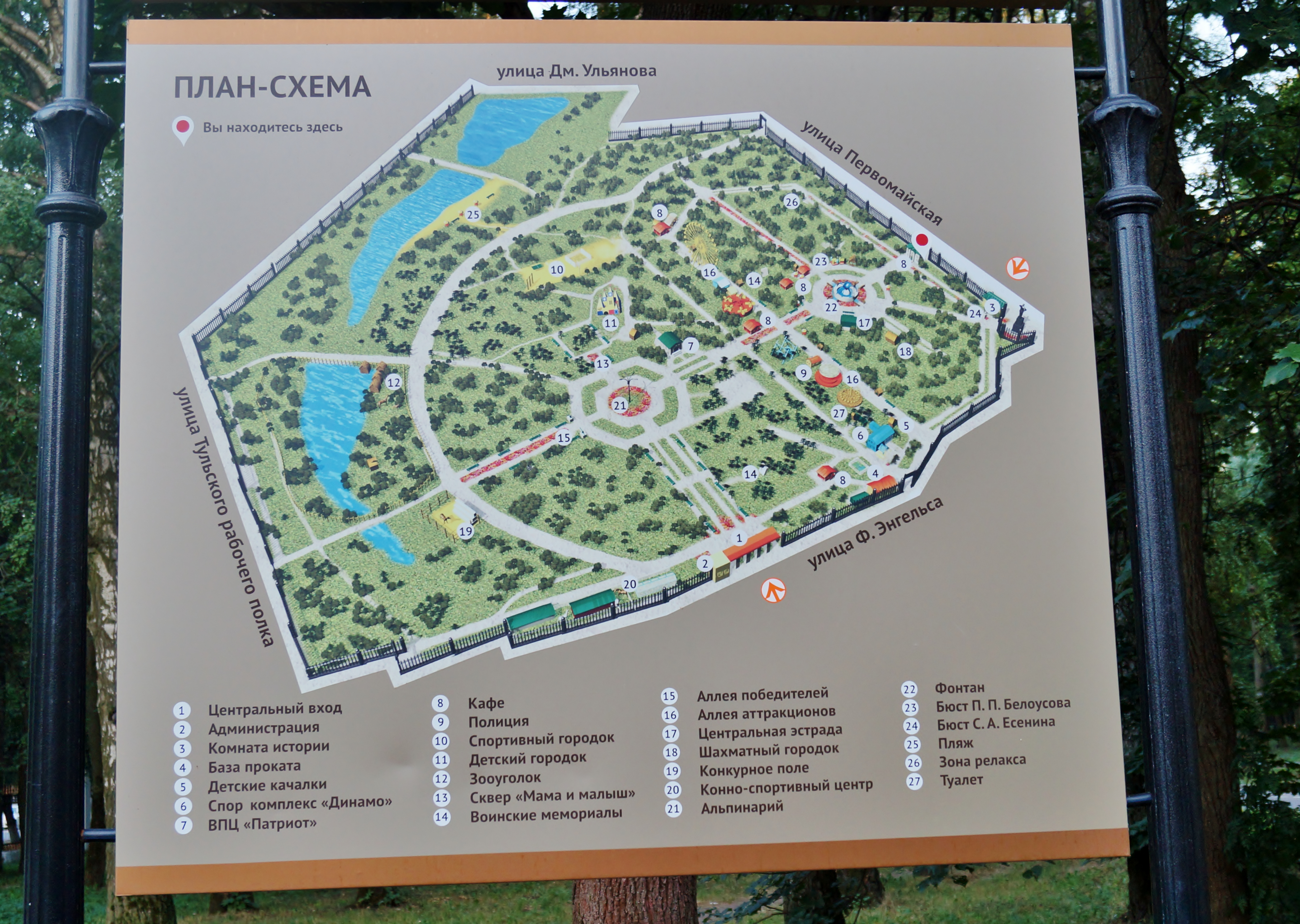 План Белоусовского парка в Туле